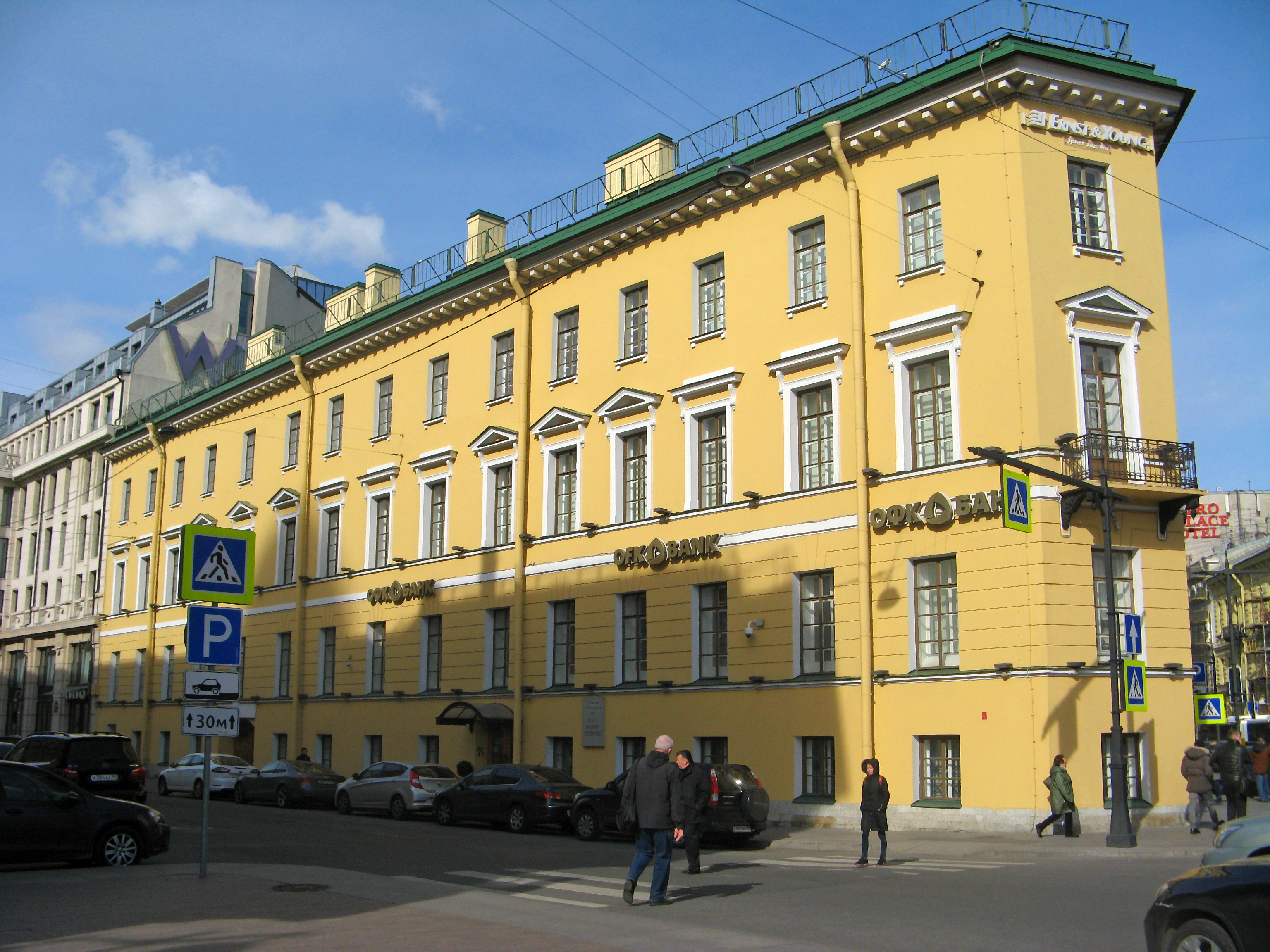 Дом Шиля. Дом, где в 1847-1849 гг. жил писатель Ф.М. Достоевский: Вознесенский проспект, 8, Малая Морская улица, 23, Адмиралтейский район, Санкт-Петербург